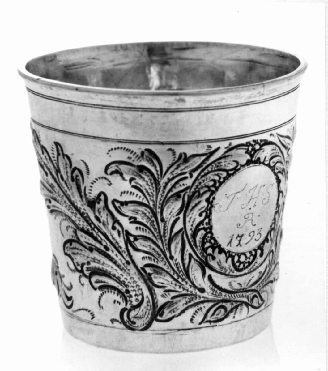 Drikkebeger i sølv med gravert inskripsjon: THSR 1793 og stemplet: LH IS/82, laget av Jacob Steen. Høyde 7 cm. Foto Norsk Folkemuseum, NF.1944-1279.